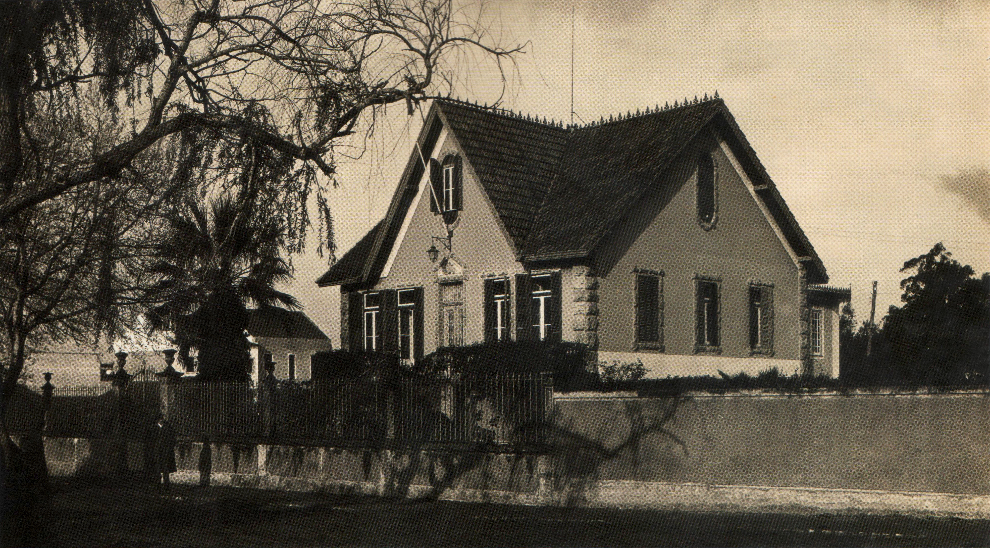 Villa Palmira (anos 20), Bombarral